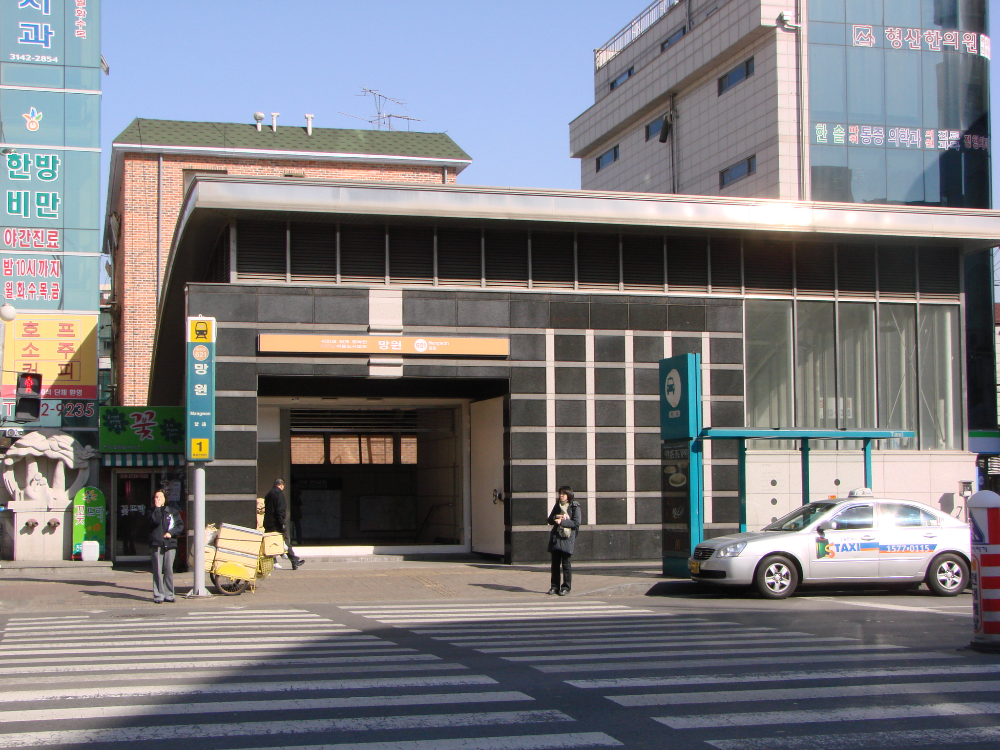 서울도시철도공사 6호선 망원역 1번출구